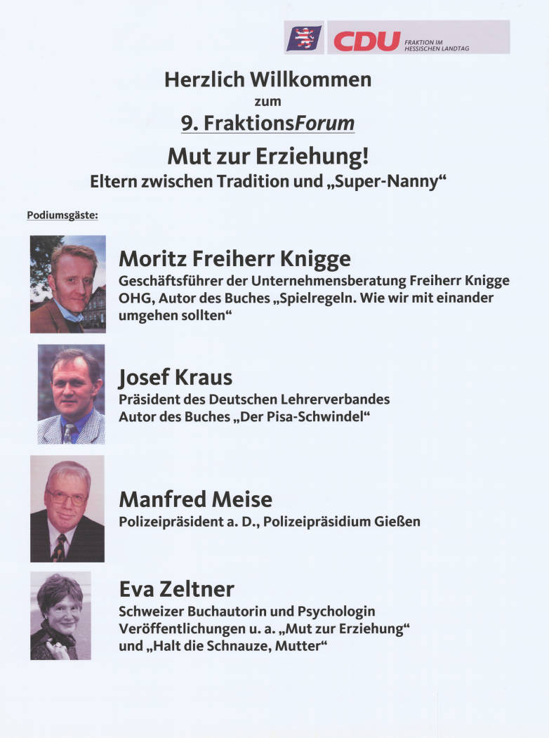 Herzlich Willkommen zum 9. FraktionsForum Mut zur Erziehung! Eltern zwischen Tradition und "Super-Nanny" Podiumsgäste: Moritz Freiherr Knigge Geschäftsführer der Unternehmensberatung Freiherr Knigge OHG ... Josef Kraus Präsident des Deutschen Lehrerverbandes ... Manfred Meise Polizeipräsident a.D. ... Eva Zeltner Schweizer Buchautorin und Psychologin ... Abbildung: Porträtfotos Plakatart: Ankündigungsplakat Auftraggeber: CDU Fraktion im Hessischen Landtag Objekt-Signatur: 10-031 : 79 Bestand: CDU-Plakate (10-031) GliederungBestand10-18: CDU-Plakate (10-031) » Parteitage, Parteikongresse Lizenz: KAS/ACDP 10-031 : 79 CC-BY-SA 3.0 DE